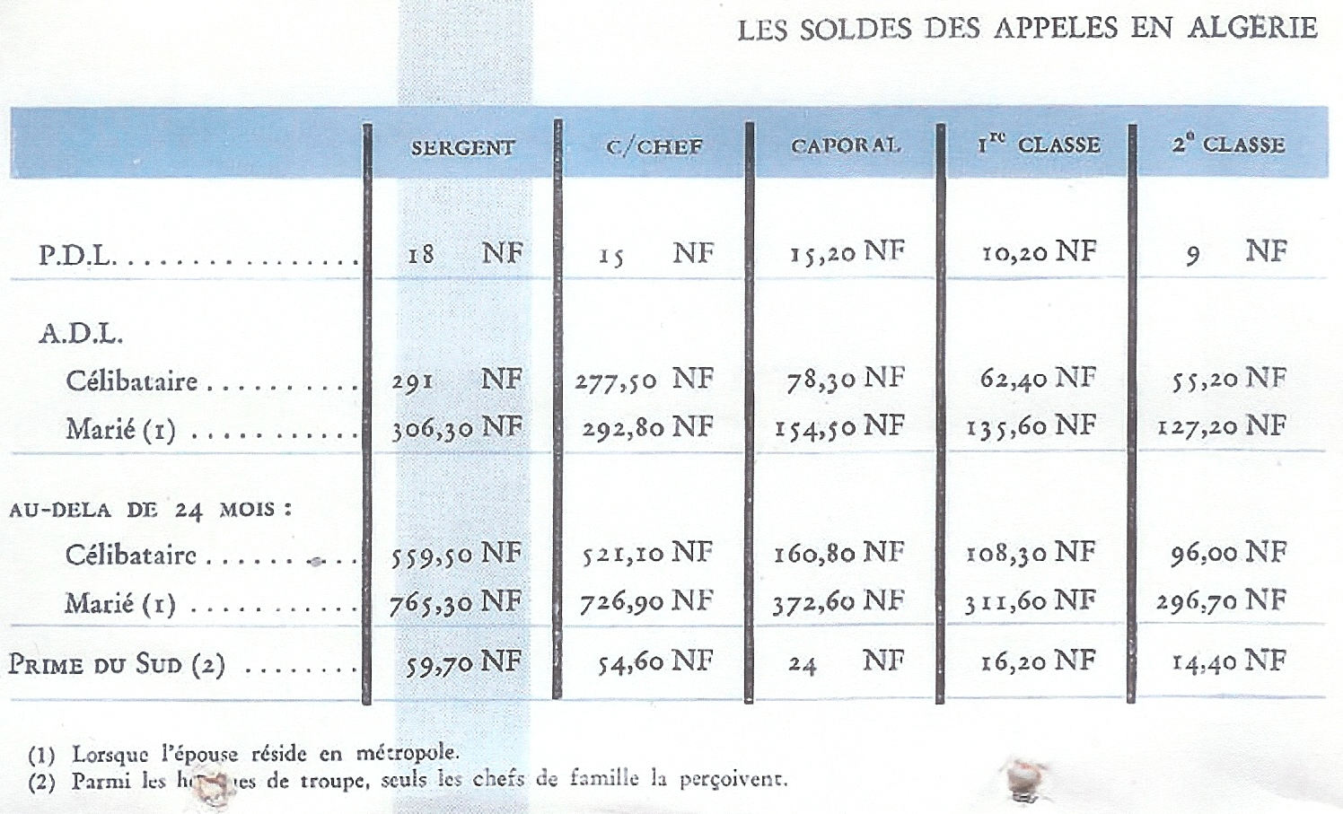 tableau officiel des soldes des appelés en Algérie en 1961-1962